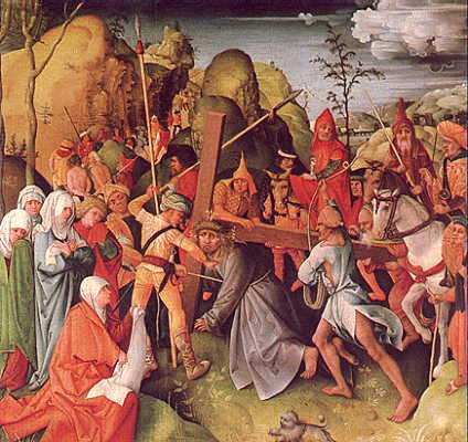 Jörg Stocker, Kreuztragung Ulmer Museum, Inv. Nr. Altertumsverein 1862